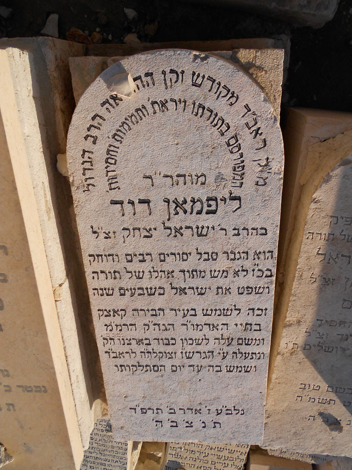 קבר ר' ליפמאן דוד שובקס בהר הזיתים